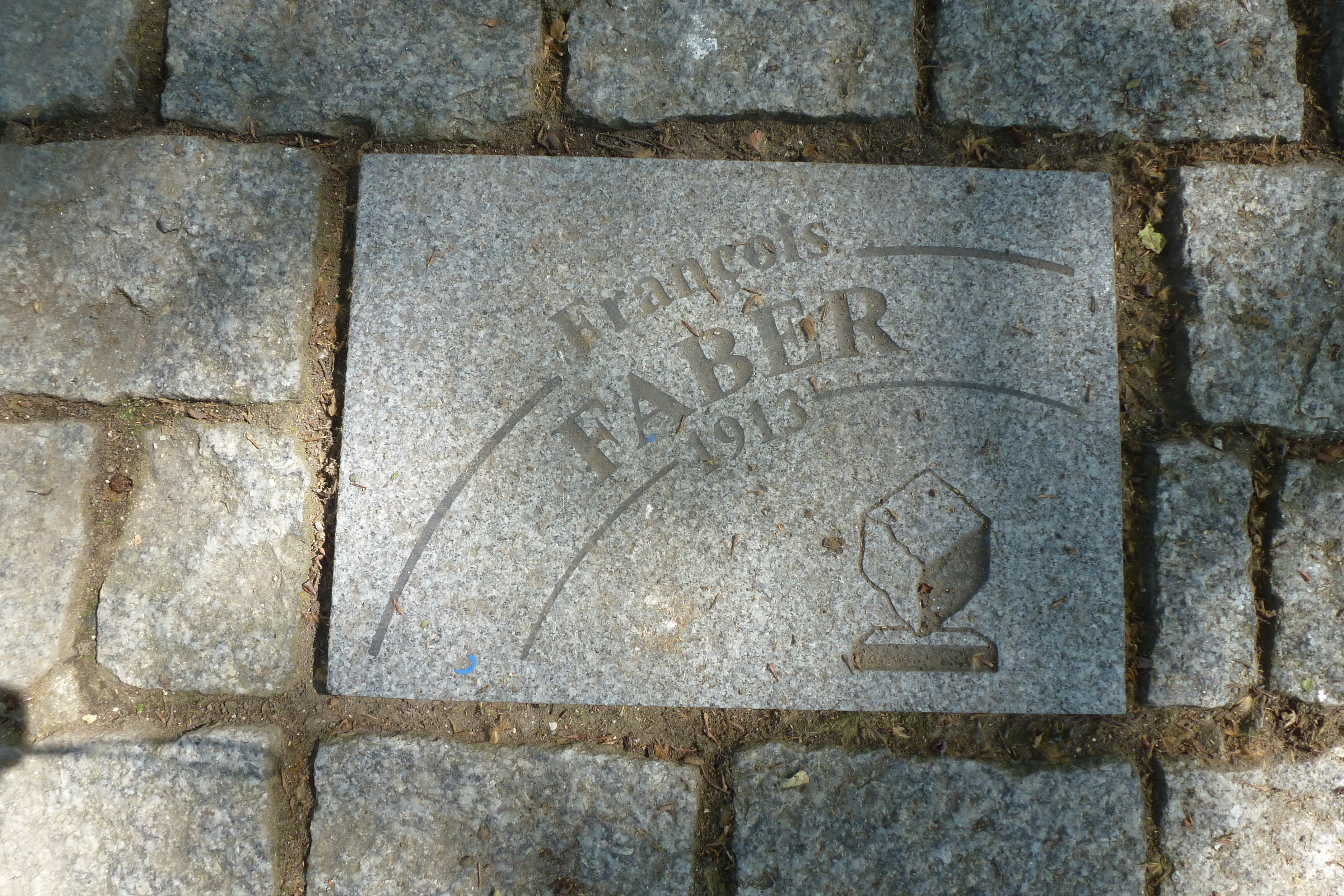 Pflasterstein für Francois Faber auf der Allee Charles Crupelandt in Roubaix